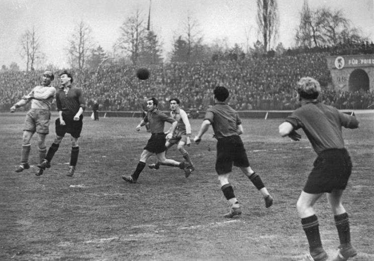 Illus-TBD Ko-Be. 7.3.51 Erfurt: Fußballspiele der Mannschaft KWU Erfurt gegen Motor Dessau am 25.2.51 im Stadion Erfurt mit 1:2 für Dessau.